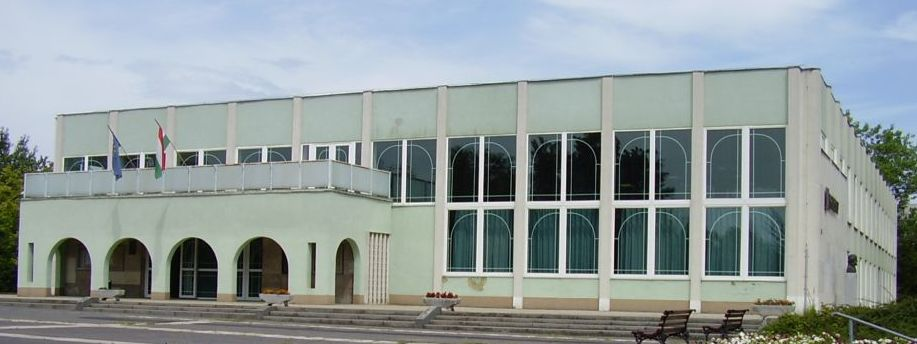 Egressy Béni Könyvtár, Kulturális és Sport Központ (Kazincbarcika, Fő tér 5.)